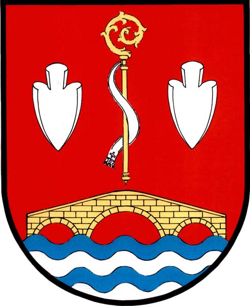 Znak obce Sobčice